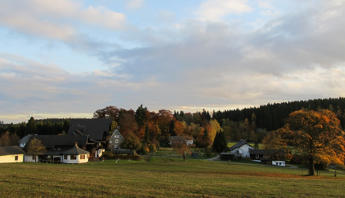 Schmallenberg-Jagdhaus (Germany)